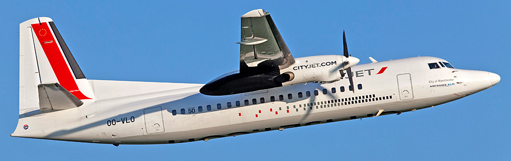 OO-VLO FK50 Cityjet